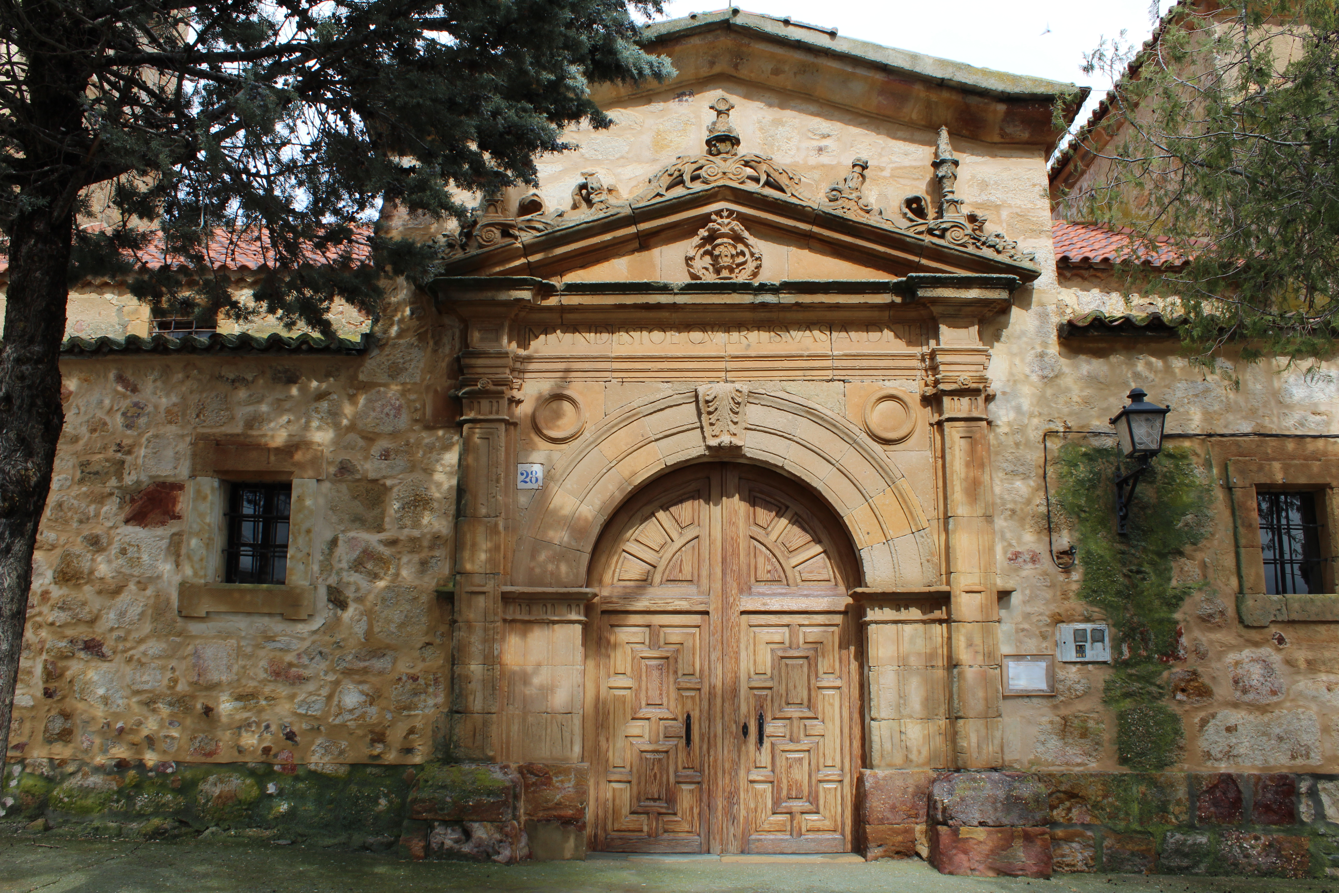 Entrada a la Iglesia parroquial de San Benito, en Machacón. La entrada parece un añadido del siglo XVII.